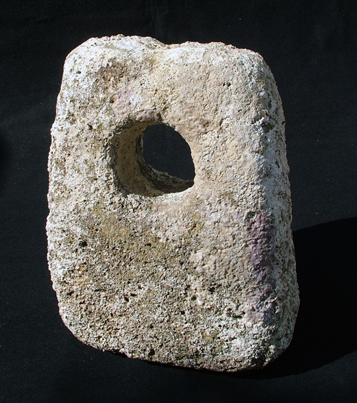 Ancla Prehispánica de roca de la cultura Guancavilca (700 D.C.)